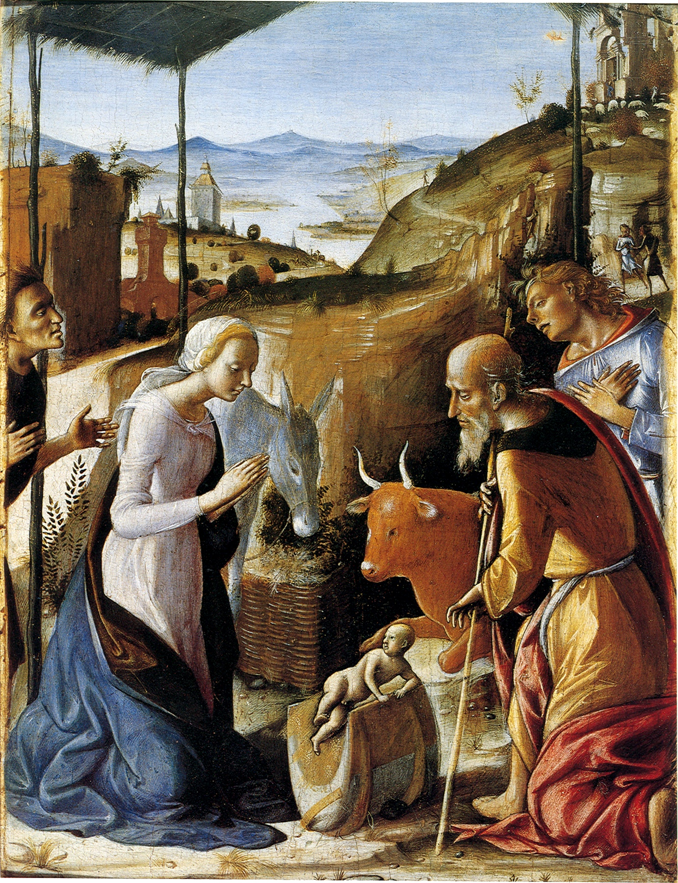 Пьетро ди Франческо Ориоли (Сиена) "Рождество"